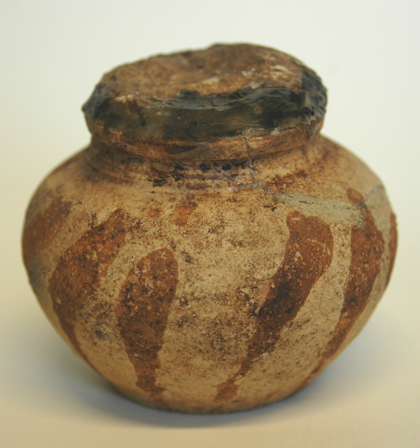 Reliquientopf, 1974 gefunden in der Kirche in Wittelbach